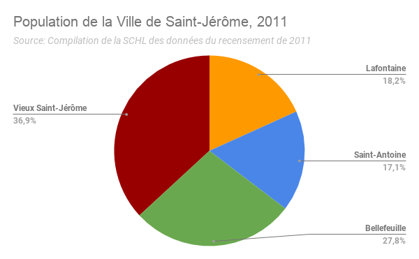 Population de la Ville de Saint-Jérôme, en pourcentage, selon les 4 secteurs de la Ville.